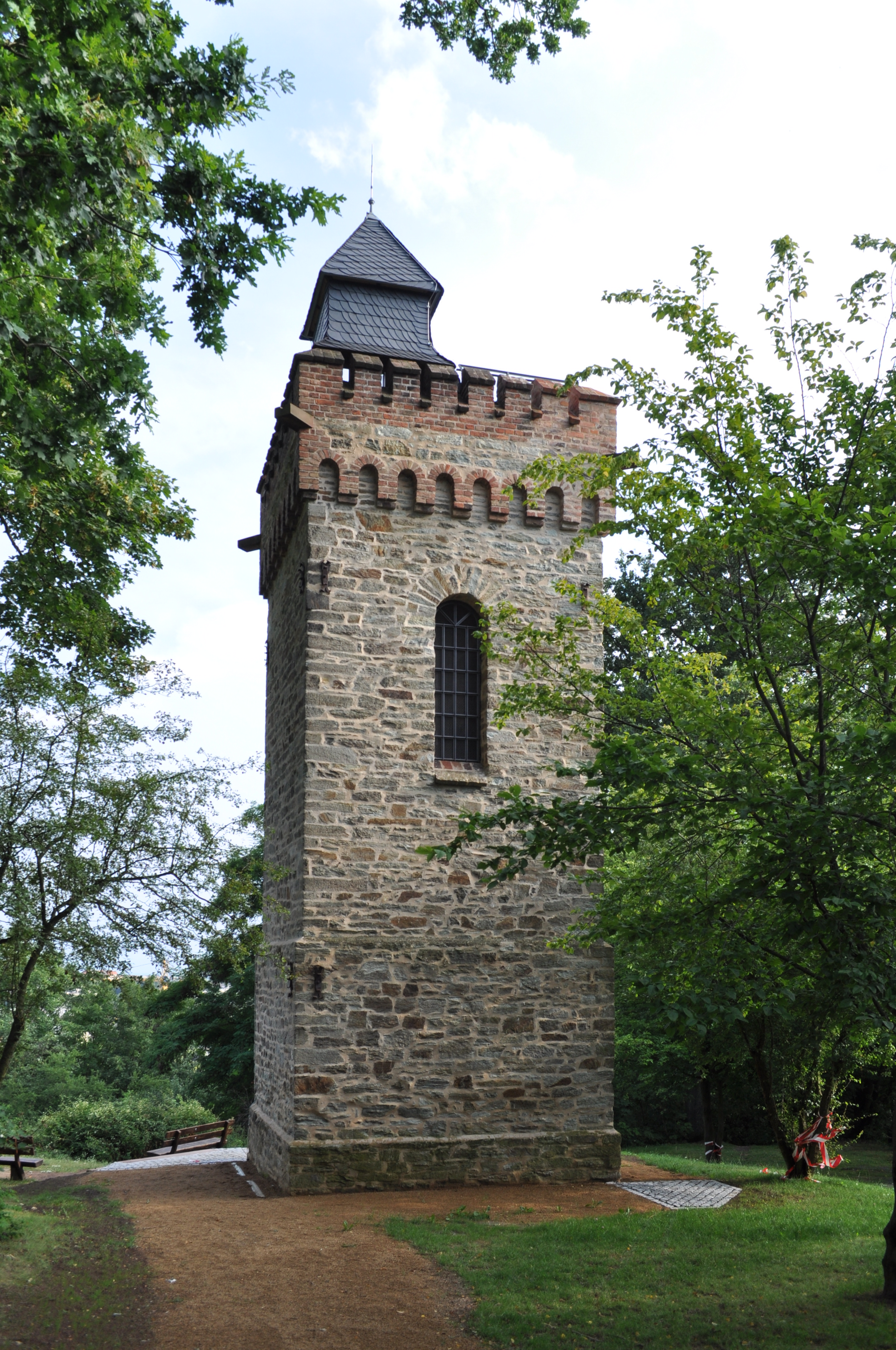 Burgbergturm in Bad Soden, Ansicht von oben